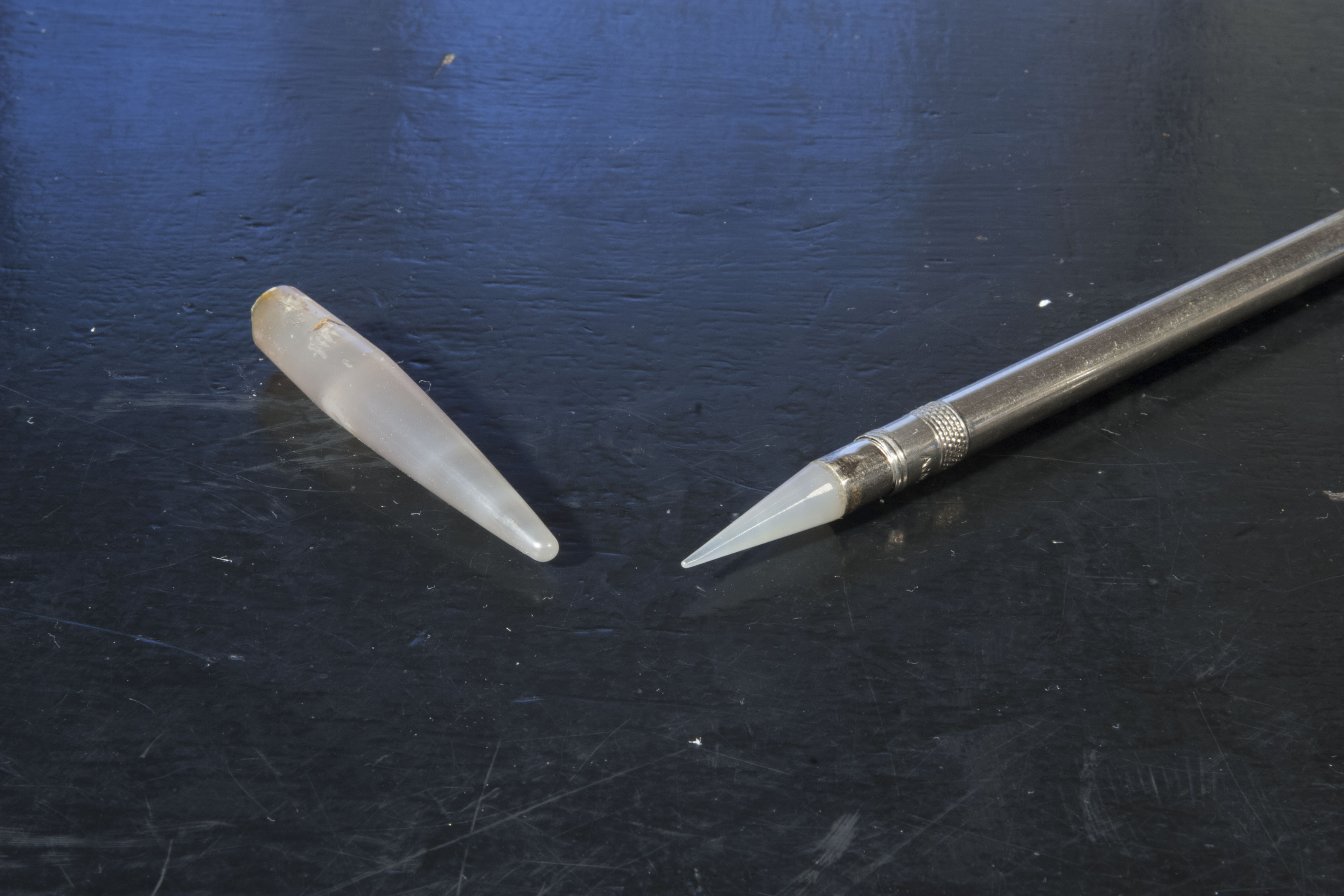 Agatstifter til poleringsformål. Der findes stifter i flere faconer.